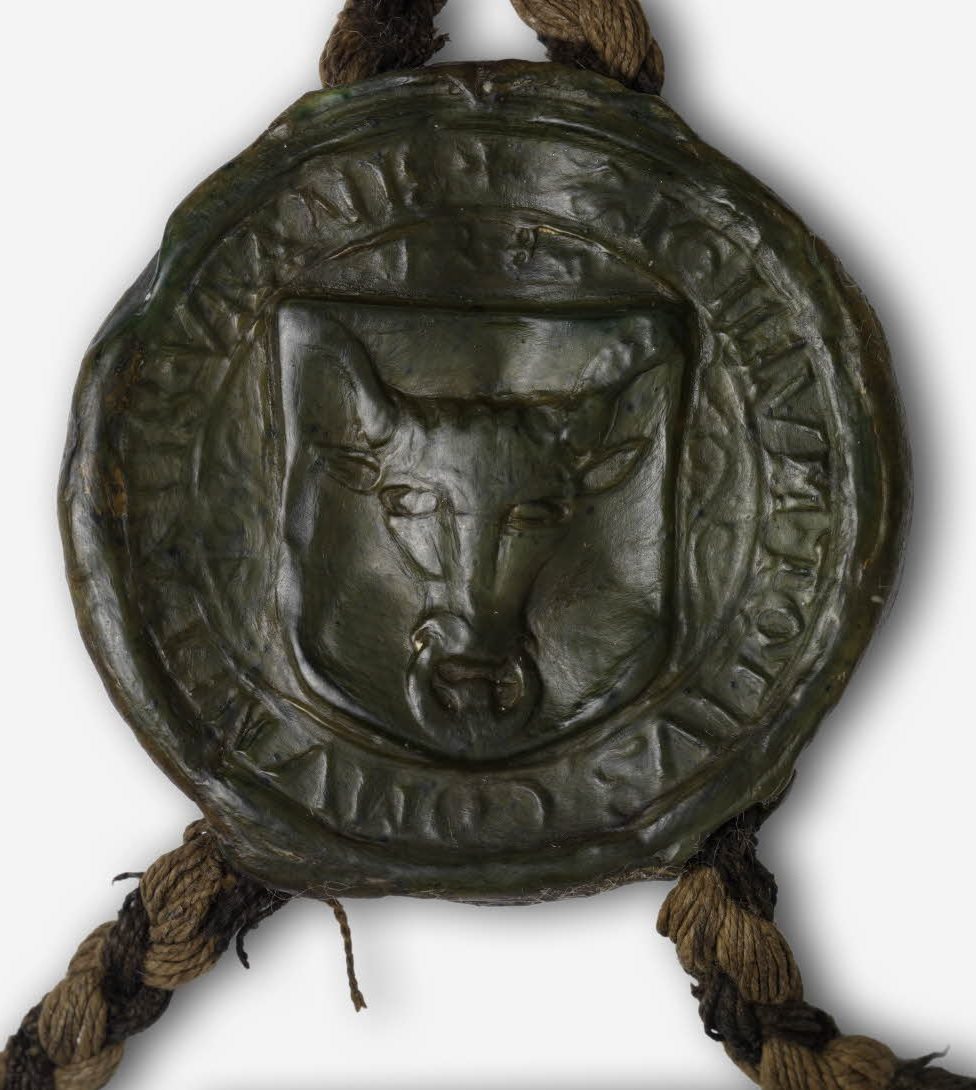 Sceau du canton de Uri, appendu au traité de Fribourg